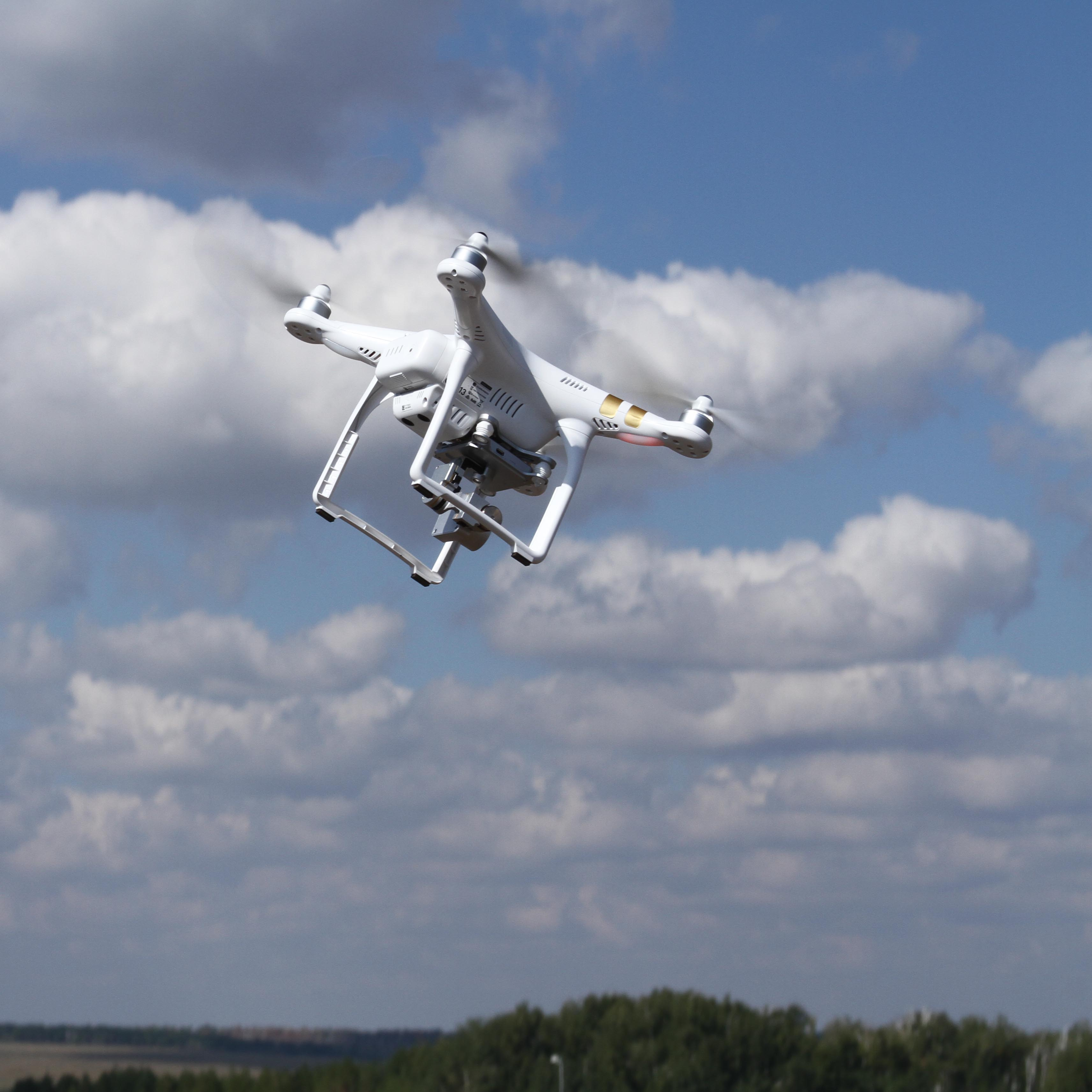 Квадрокоптер в полёте.